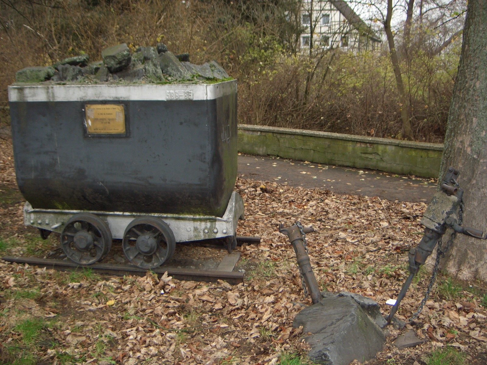 Hunt am Massener Hellweg